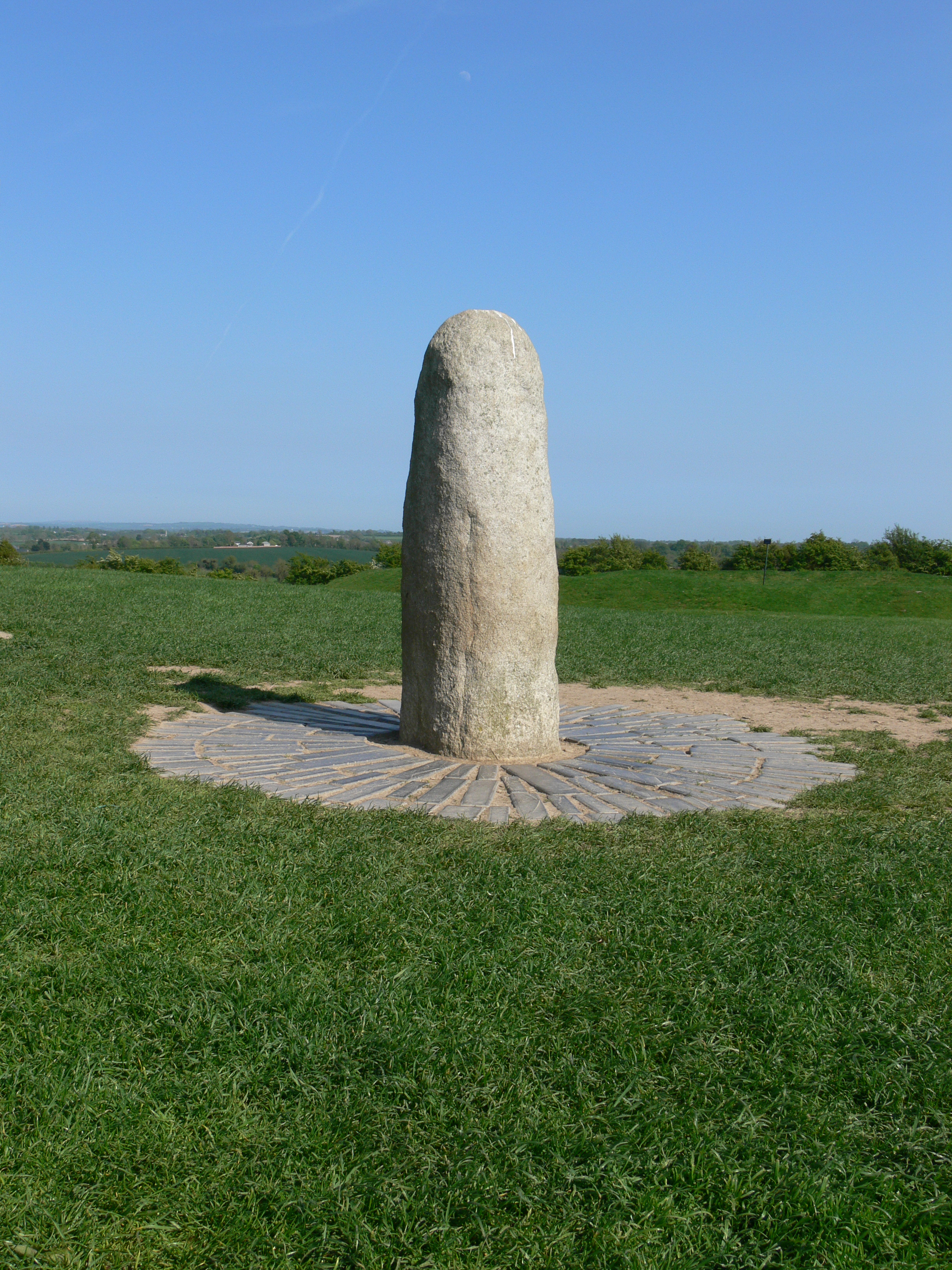 Lia Fáil